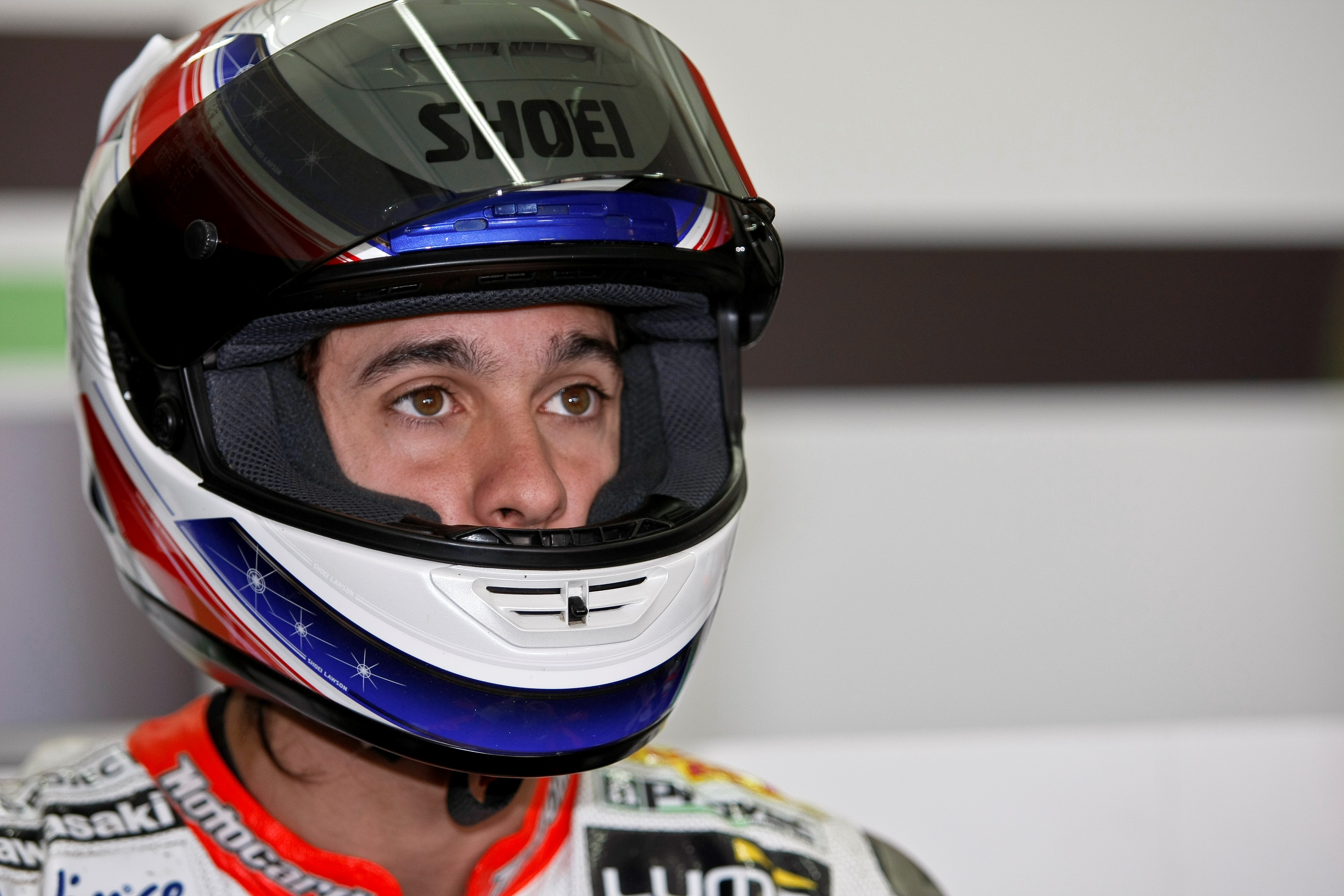 Joan al seu box durant unes proves del campionat de Supersport.